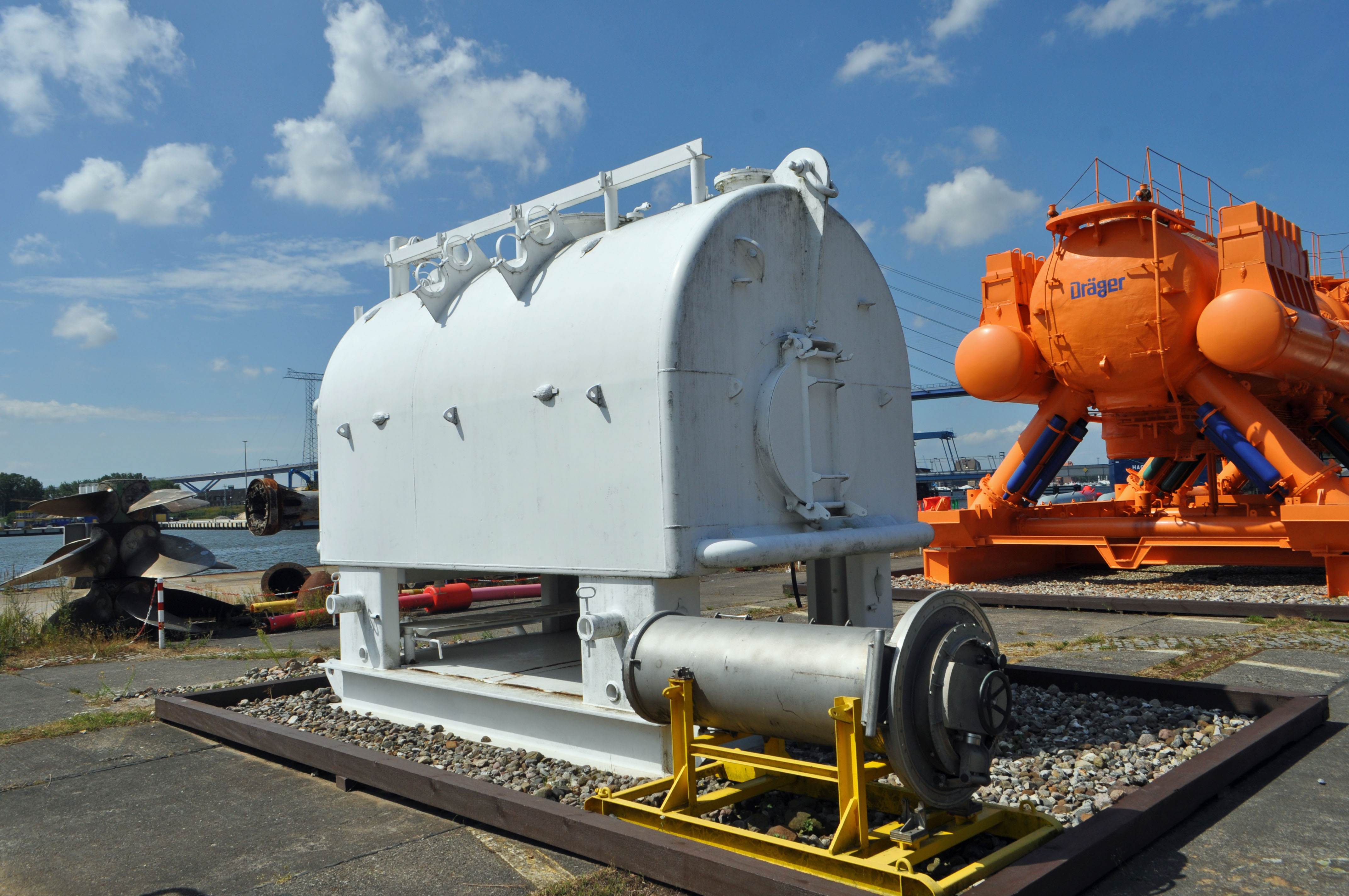 Auf dem Gelände des Nautineums auf dem Dänholm in Stralsund. Beschreibung siehe Dateiname. Unterwasser-Schweißkammer, rechts das UWL Helgoland